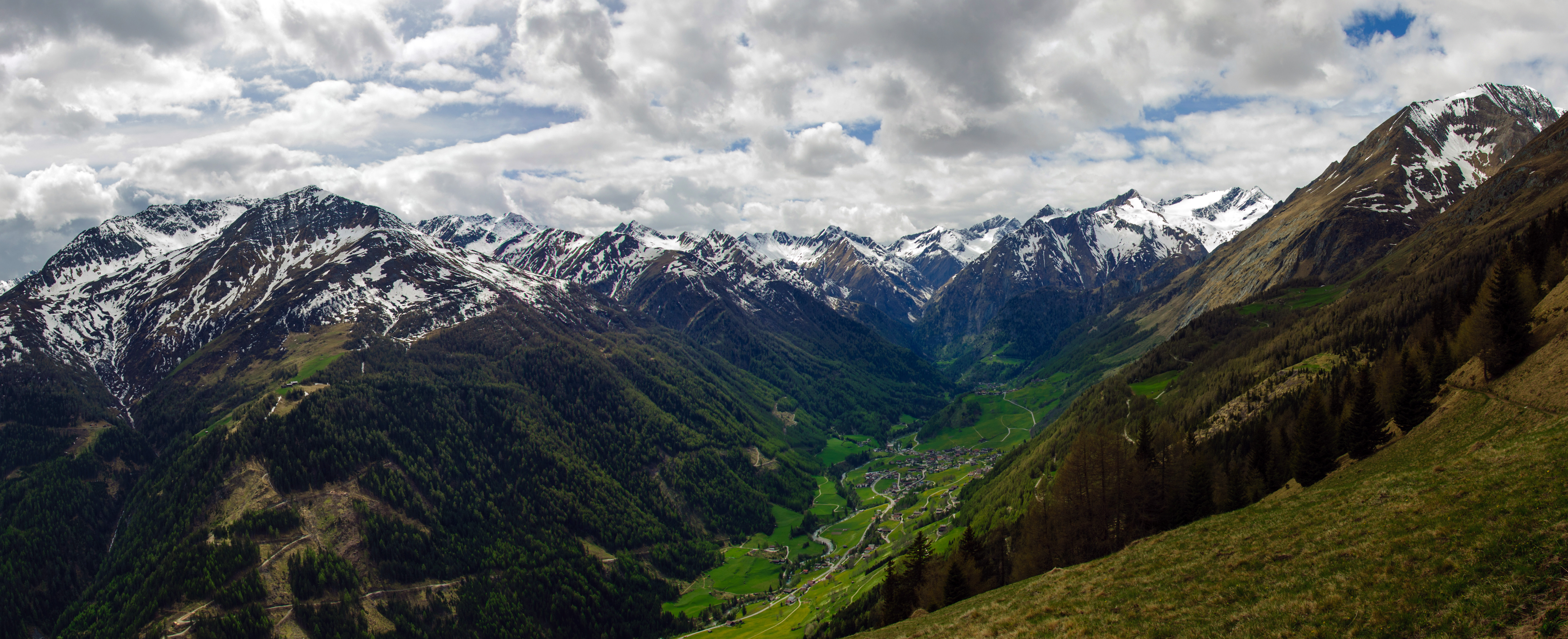 Prägraten am Großvenediger von der Nilljochhütte aus.